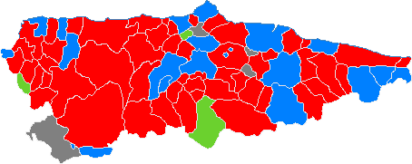 Resultado de las elecciones municipales en el Principado de Asturias (España) por concejos.Rojo: Partido Socialista Obrero Español Azul: Partido Popular Verde: Izquierda Unida-Bloque por Asturies-Los Verdes Gris: Partidos locales